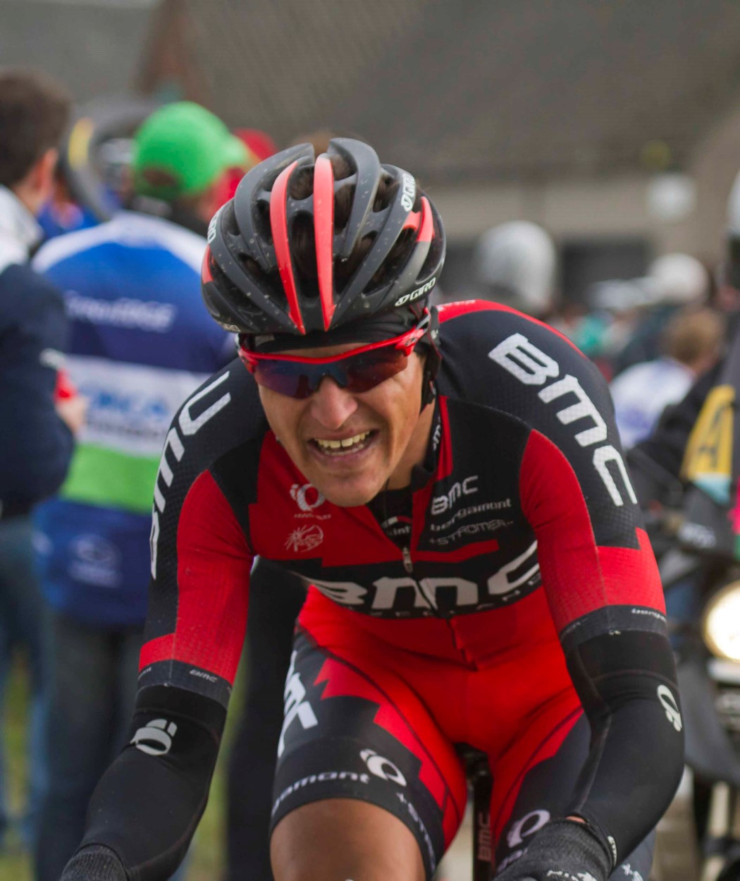 058 van avermaet top paterberg